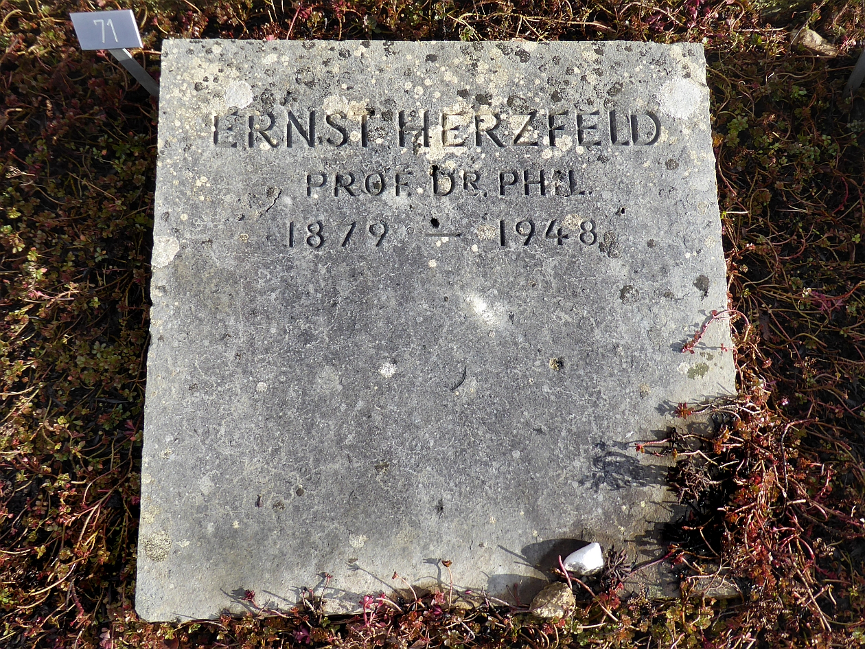 Ernst Herzfeld (1879–1948) Dr.phil., Professor, Archäologe, Altorientalist, Epigraphiker, Begründer der iranischen Archäologie. Grab auf dem Friedhof Hörnli, Riehen, Basel-Stadt